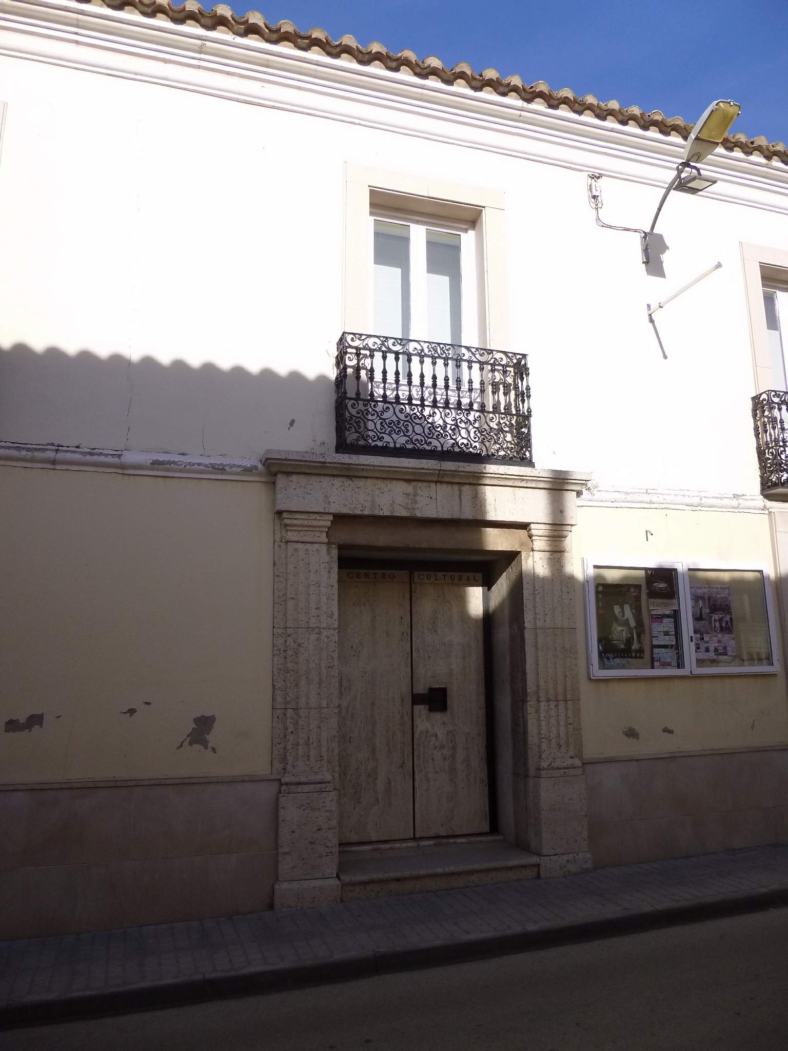 Socuéllamos (Ciudad Real)